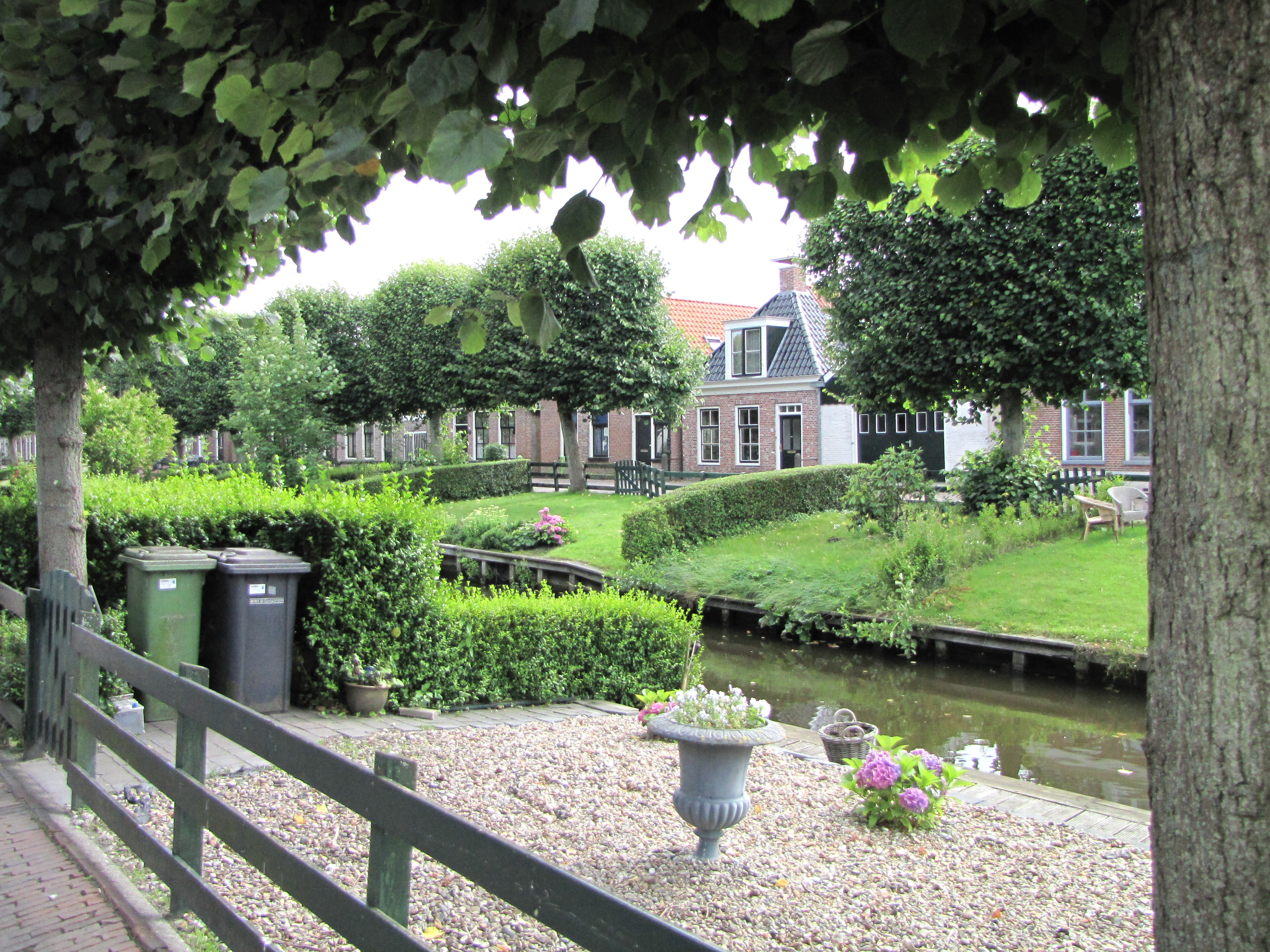 IJlst